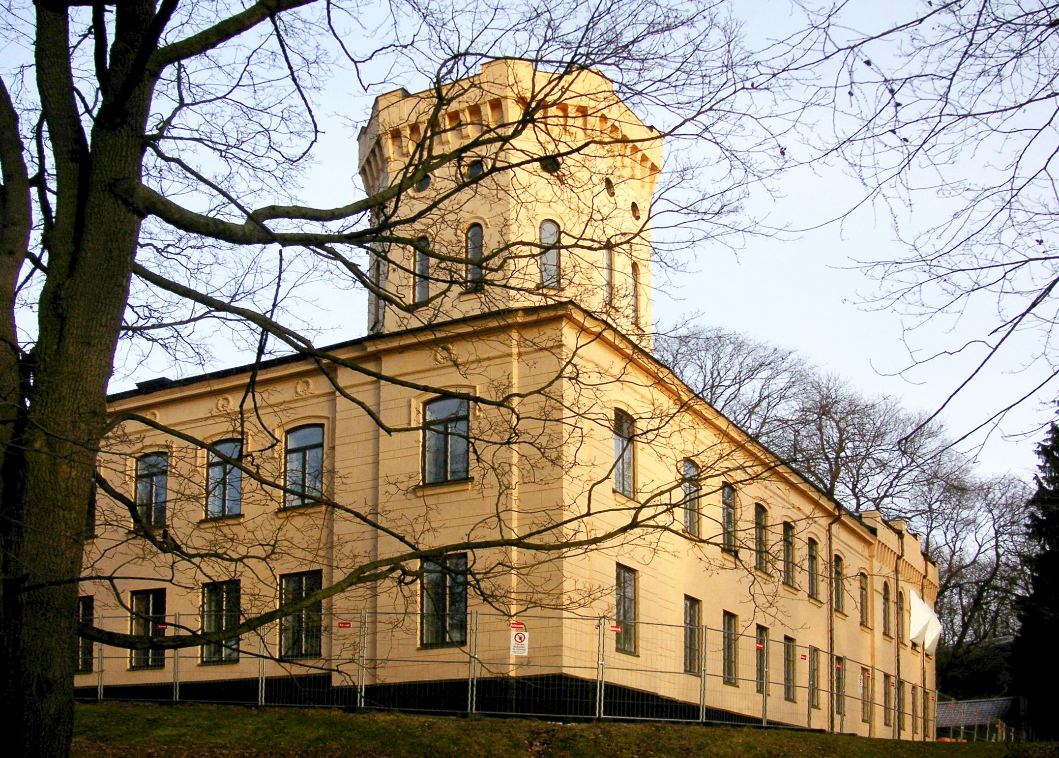 Gamla Skogsinstitutets byggna vid Strandvägen i Stockholm